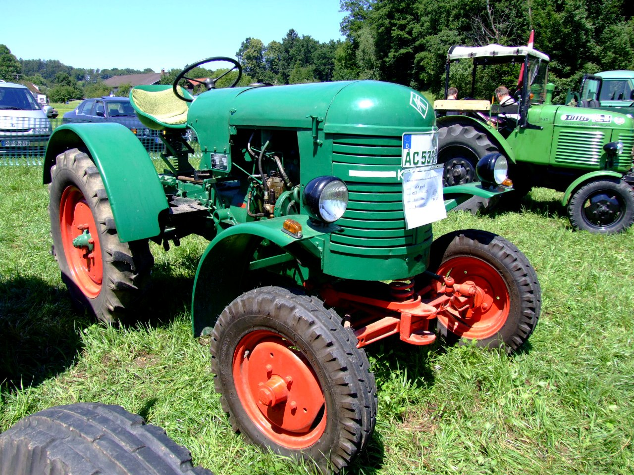 Kögel K25-A mit 22 PS, Baujahr 1952